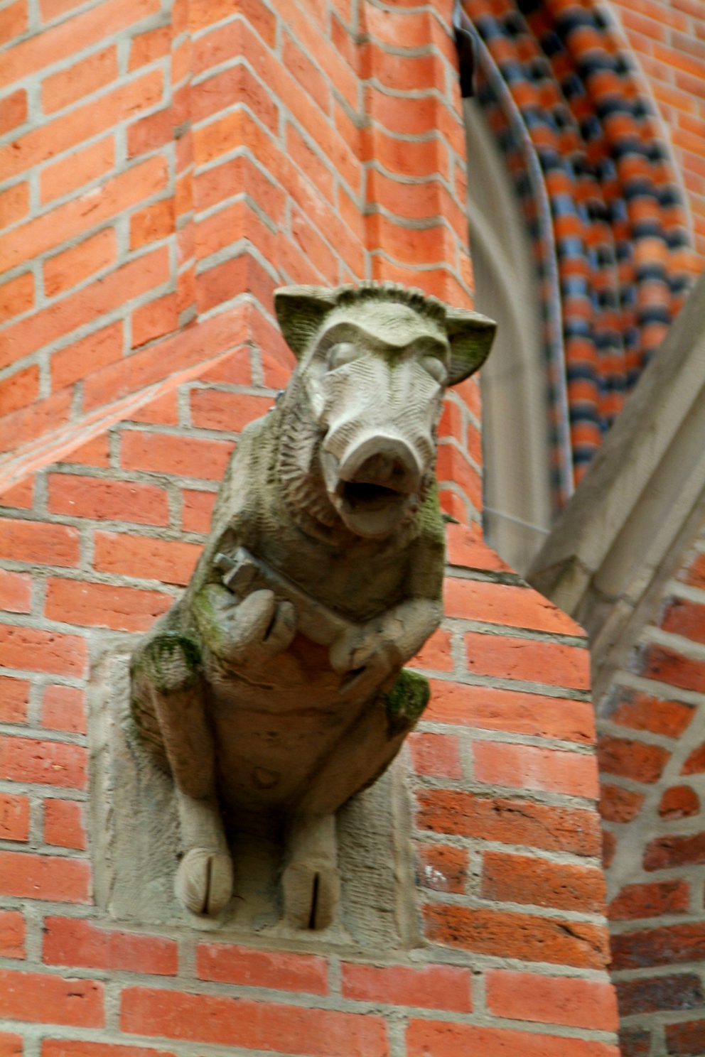 Eine von zahlreichen Skulpturen als Wasserspeier und Symbolfiguren an der Christuskirche in Hannovers Stadtteil Nordstadt zwischen Klagesmarkt und Engelbosteler Damm